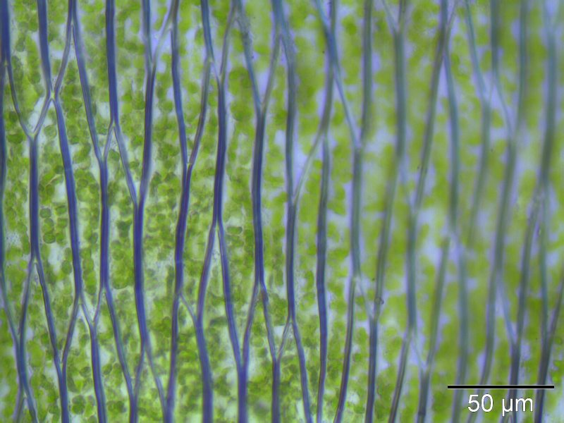 Gezähneltes Schiefbüchsenmoos (Plagiothecium denticulatum), Laminazellen bei 400x Vergr., Rostock